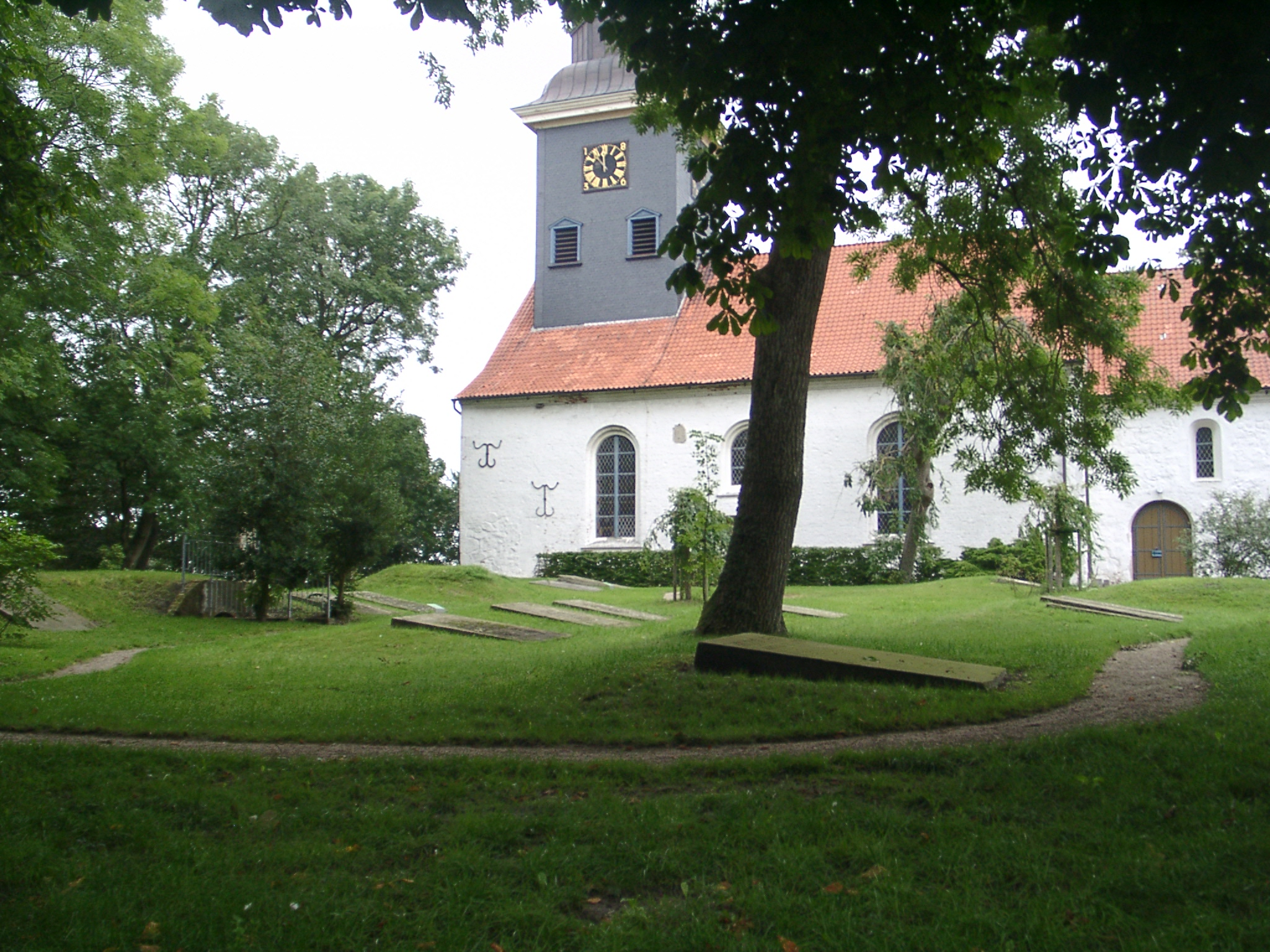 Geschlechterfriedhof